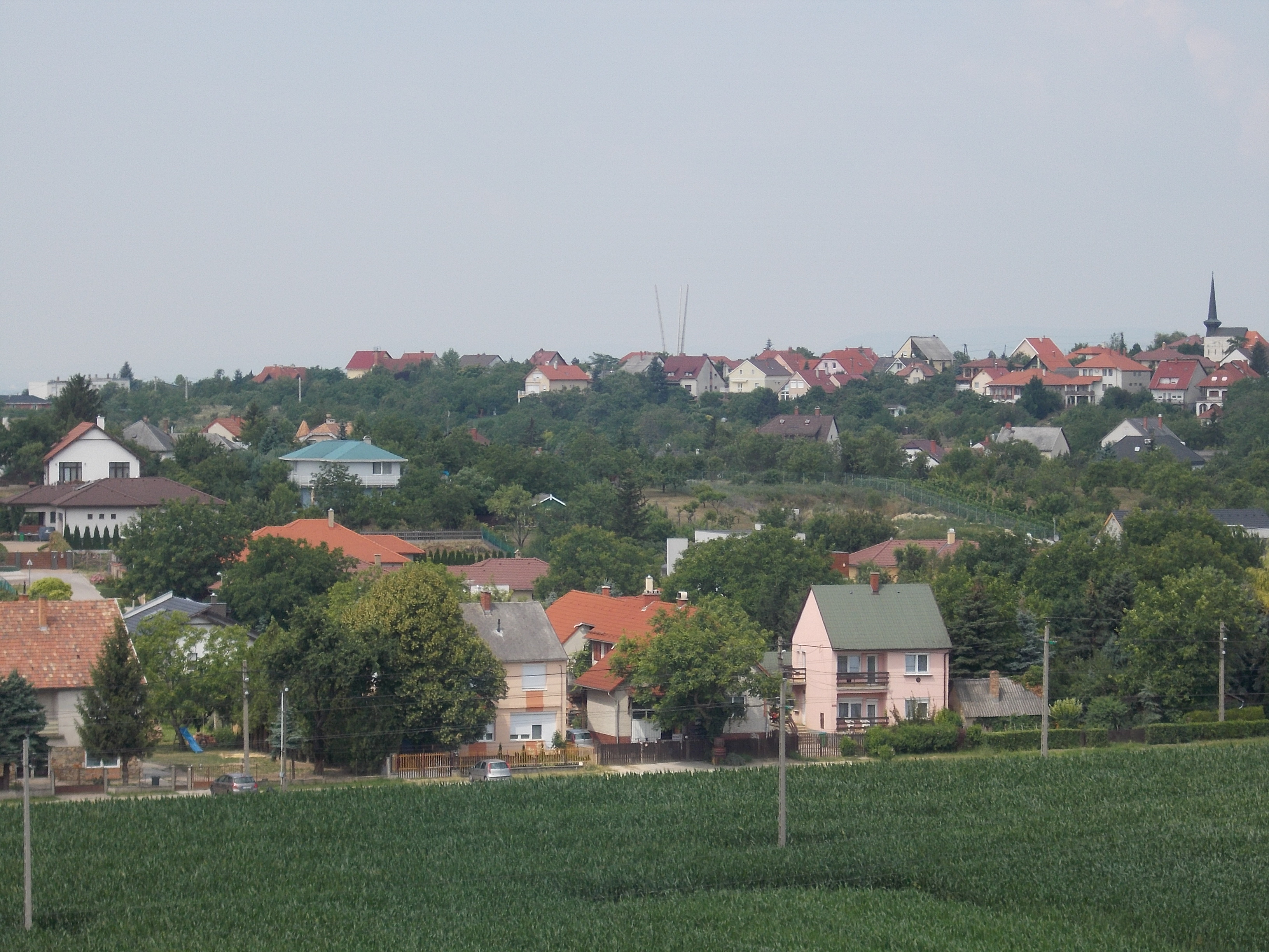 Kilátás az Aranybulla emlékműtől. Balra Öreghegy déli része, középen Millenium Emlkmű, jobbra a Donát kápolna. - Magyarország, Fejér megye, Székesfehérvár, Öreghegy.